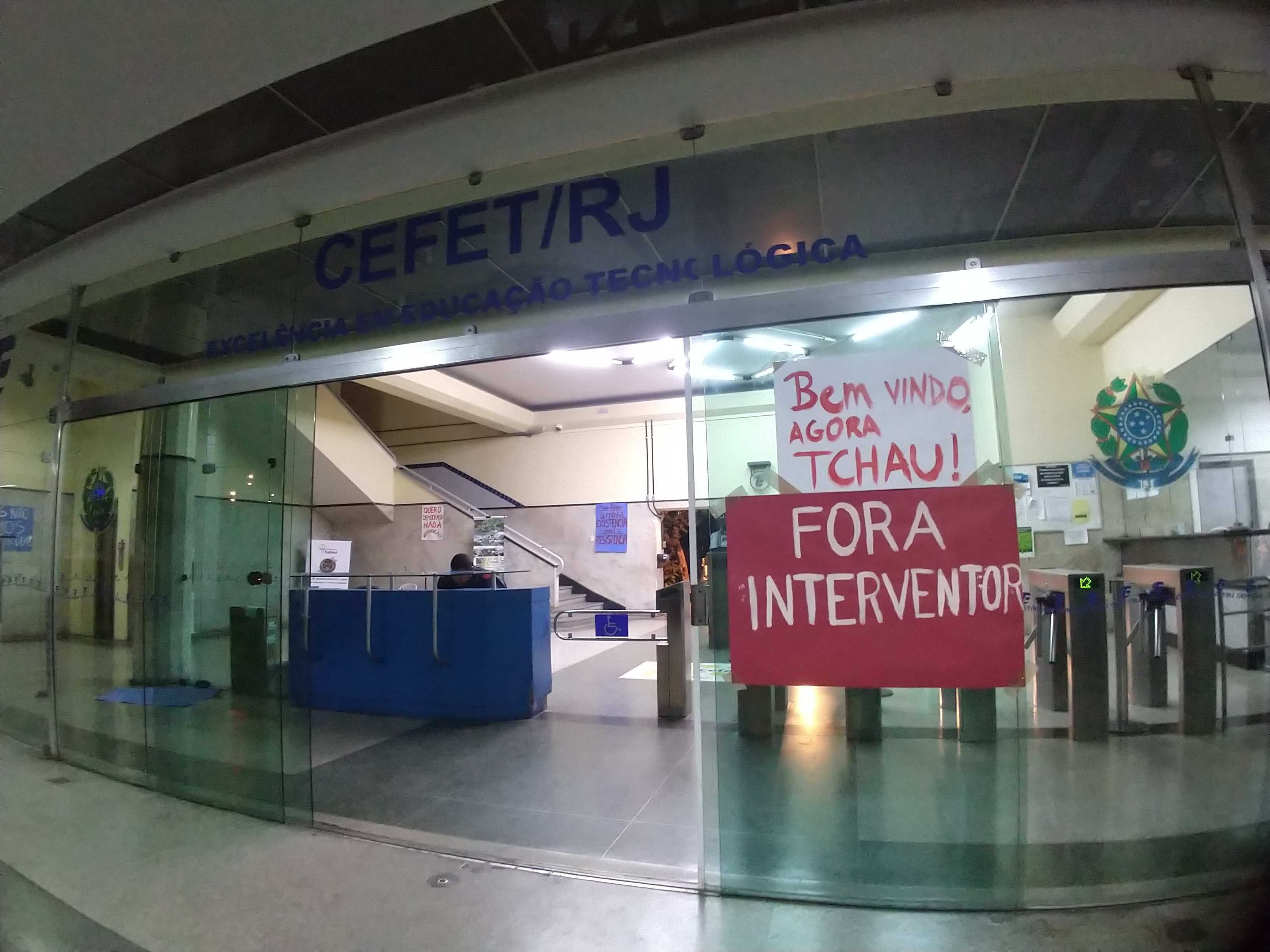 Cartazes de manifestação contra suposta intervenção do MEC na direção-geral do CEFET/RJ em 2019